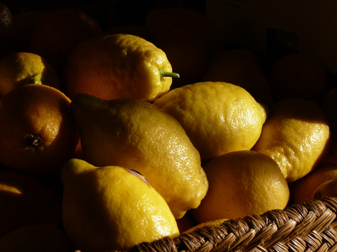 Mature spanish lemons (Citrus x limon)